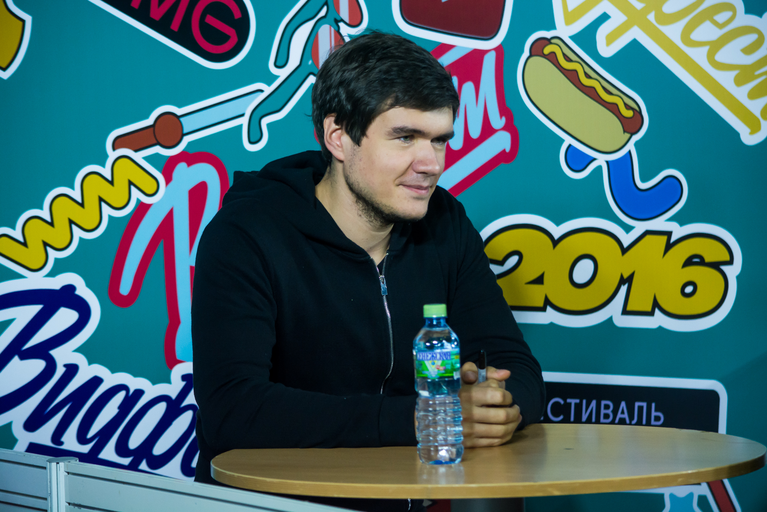 Евгений Баженов на Видфест 2016 в Москве